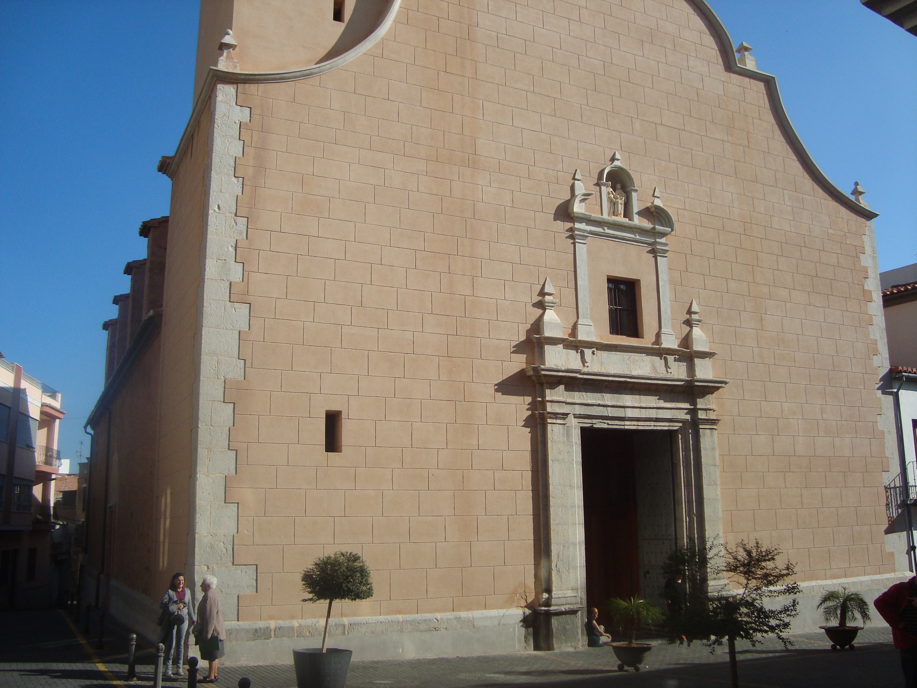 Iglesia Parroquial de la Sagrada Familia de La Vilavella (Castellón)